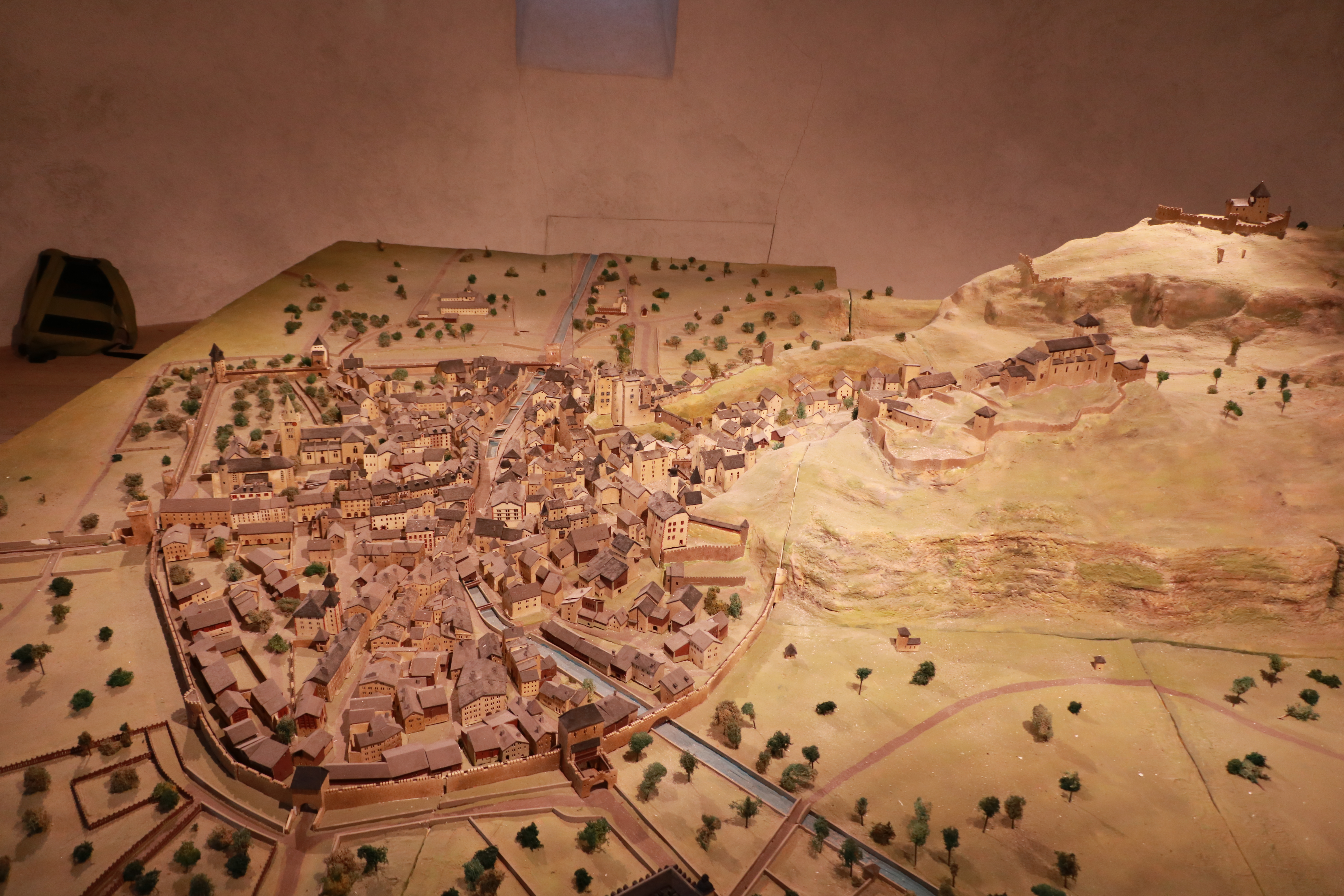 Maquette de la ville de Sion, à partir de la reproduction de la ville de Sion de 1654. Voir File:De Merian Helvetiae, Rhaetiae et Valesiae 177.png